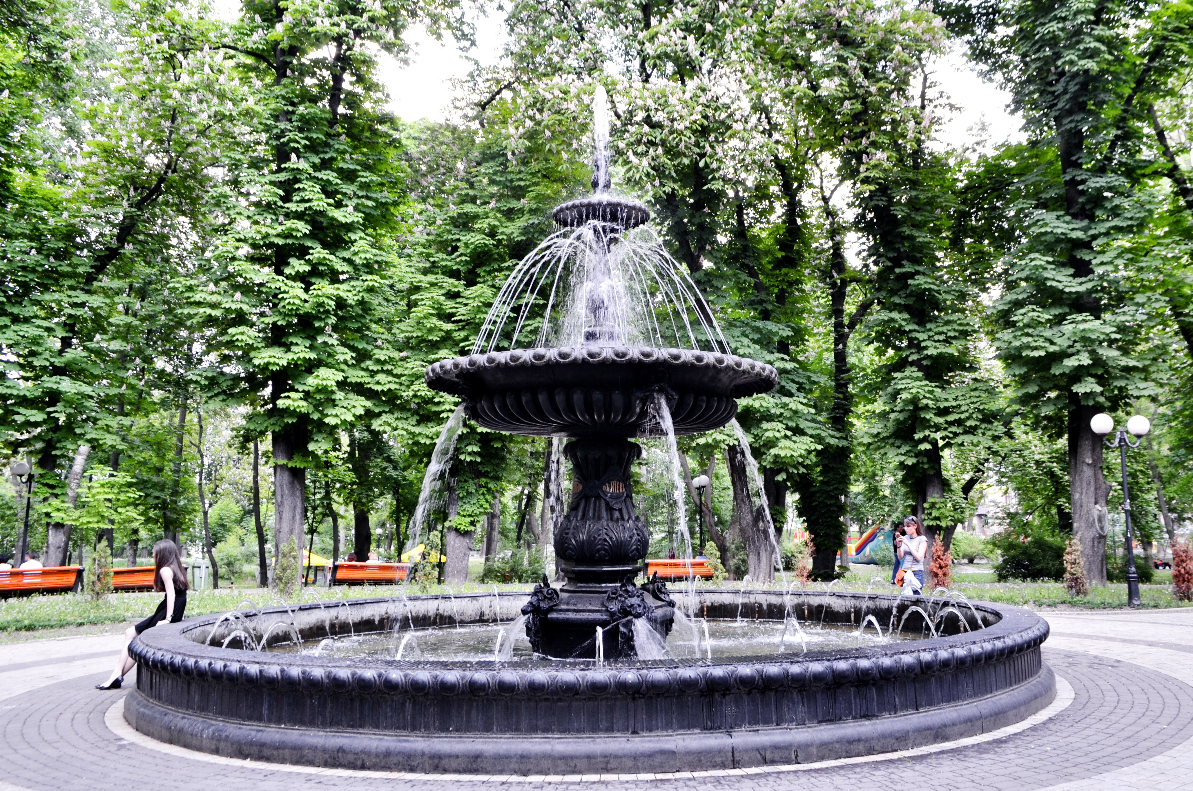 Маріїнський, Печерський район